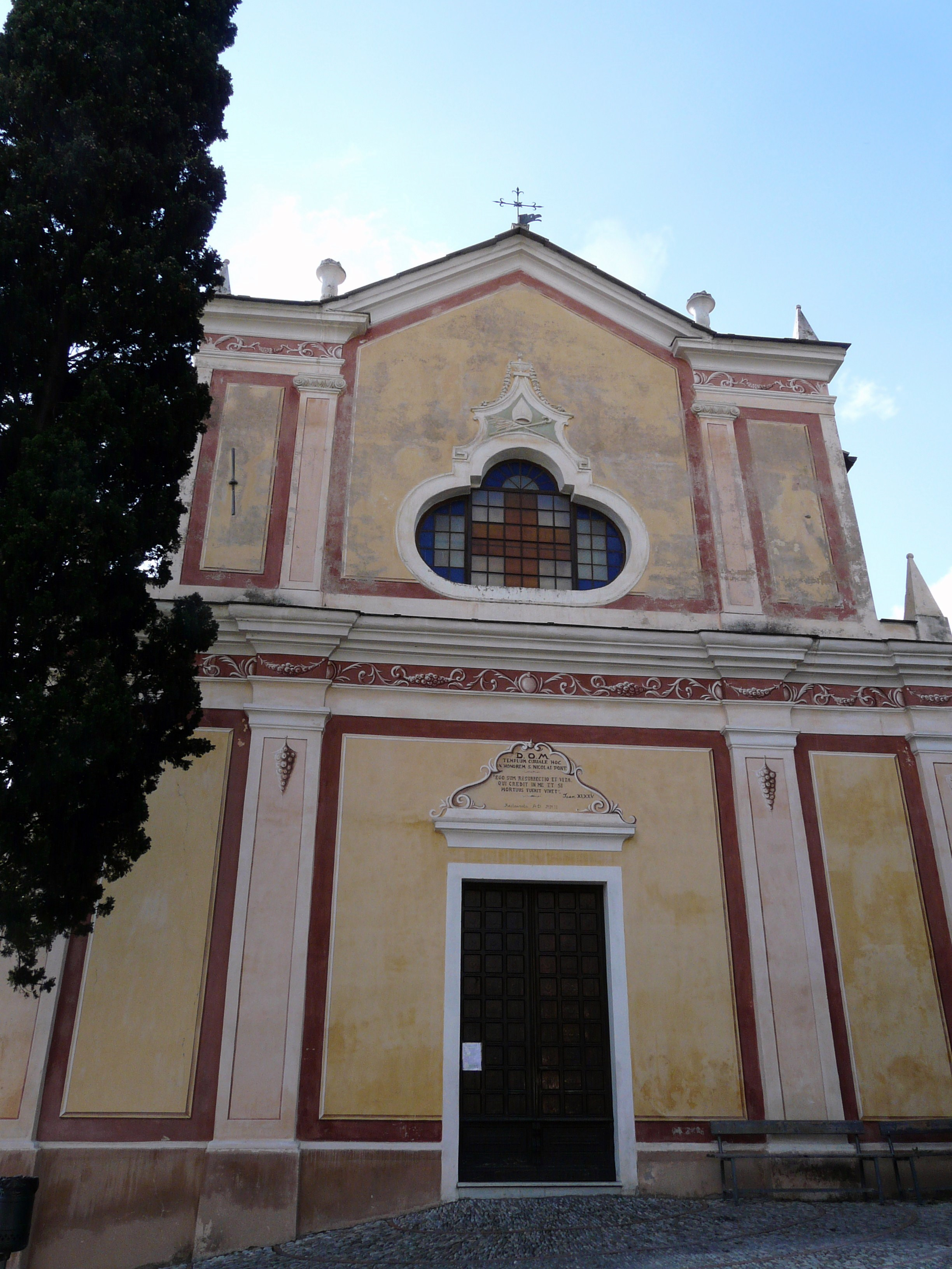 Chiesa di San Nicolò, Borghetto San Nicolò, Bordighera, Liguria, Italia